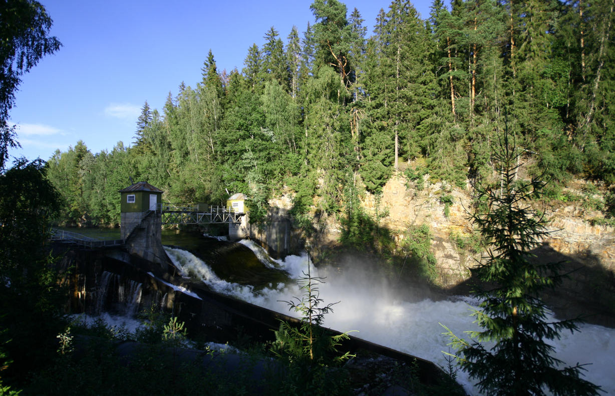 Kistefoss in river Randselva, Jevnaker, Oppland, Norway.